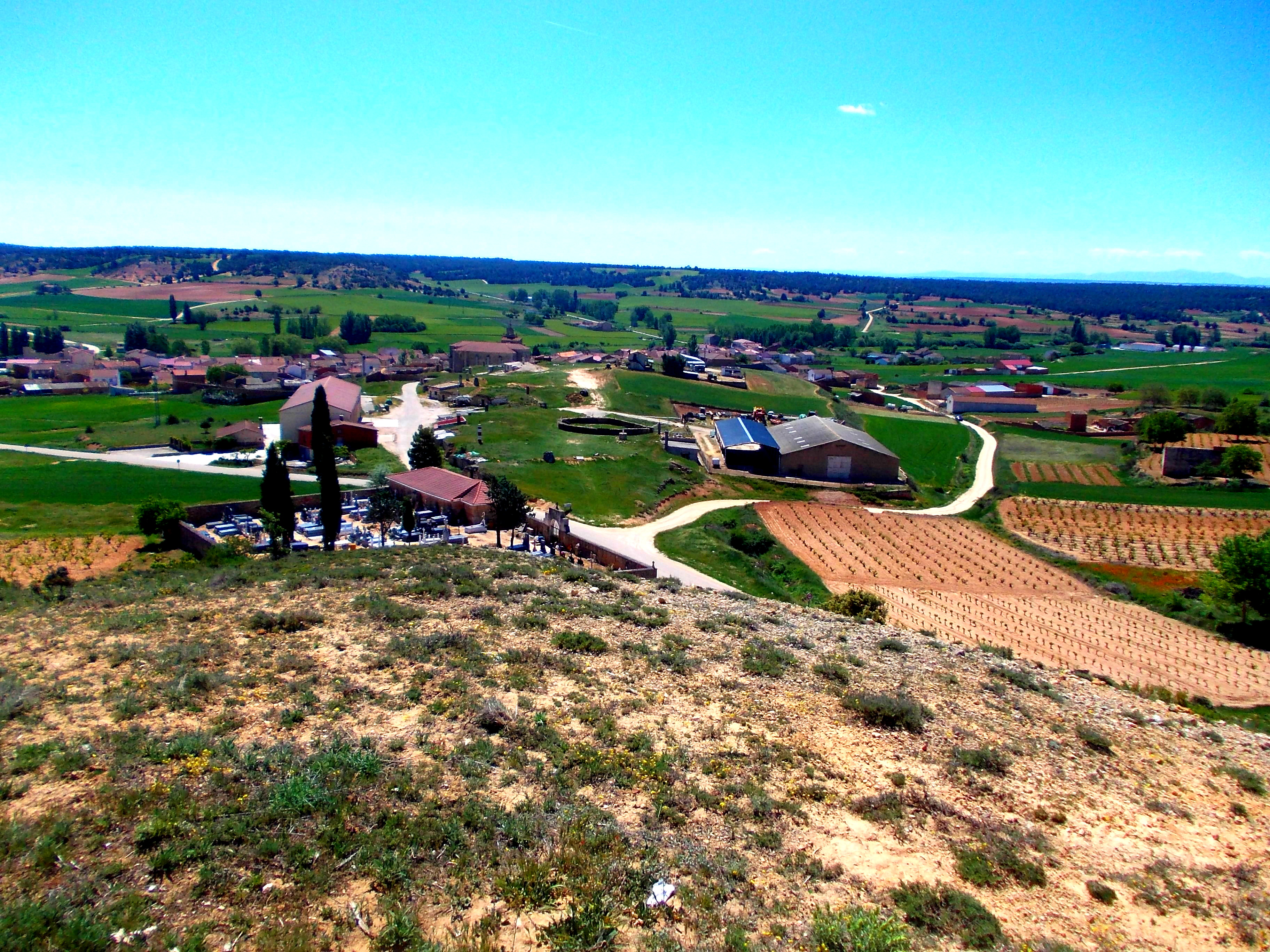 Foto de Hontoria de Valdearados desde la cruz que está en el alto del pueblo